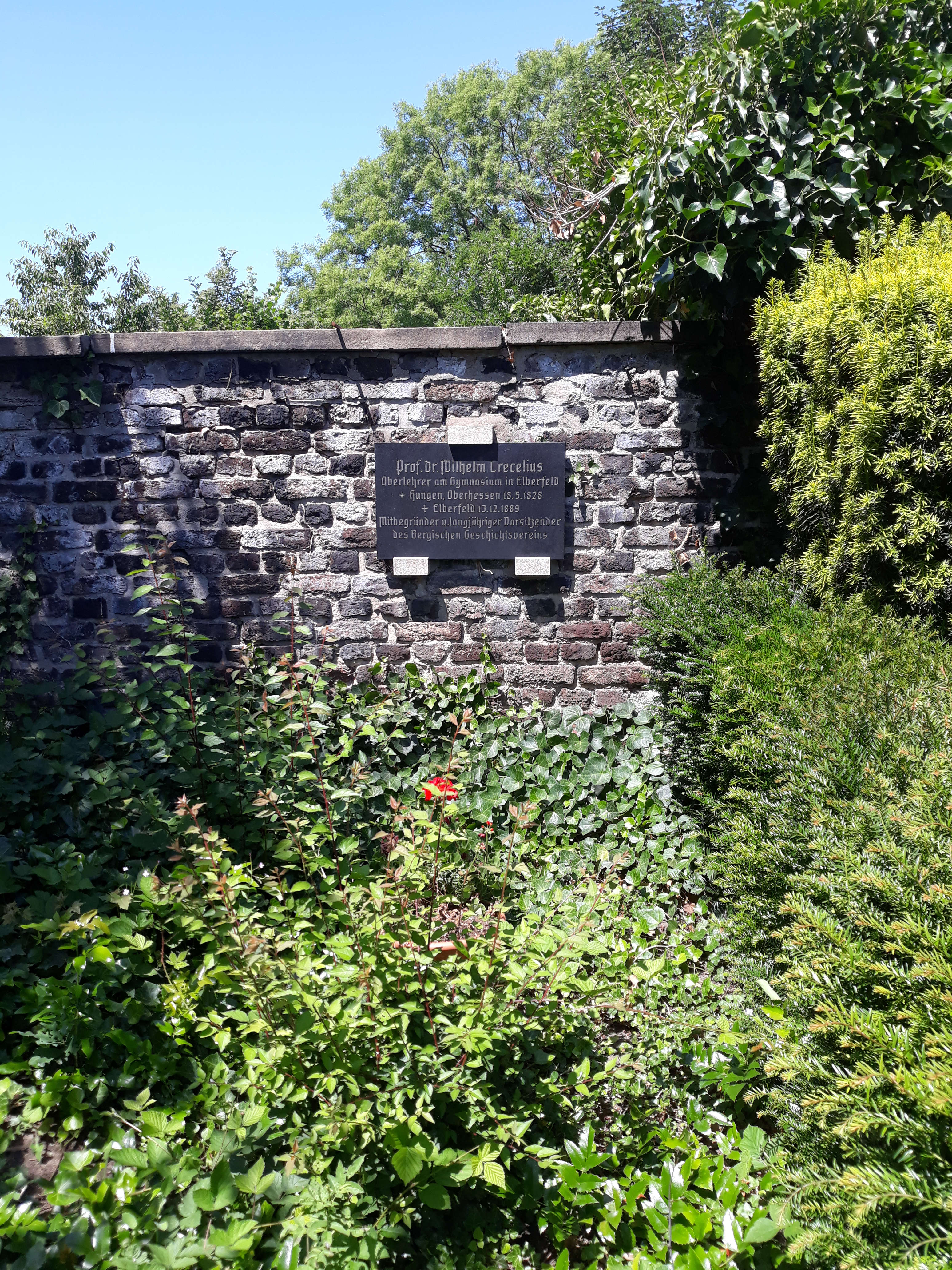 Das Grab des deutschen Gymnasiallehrers und Historikers Wilhelm Crecelius auf dem Lutherischen Friedhof Hochstraße in Wuppertal-Elberfeld.